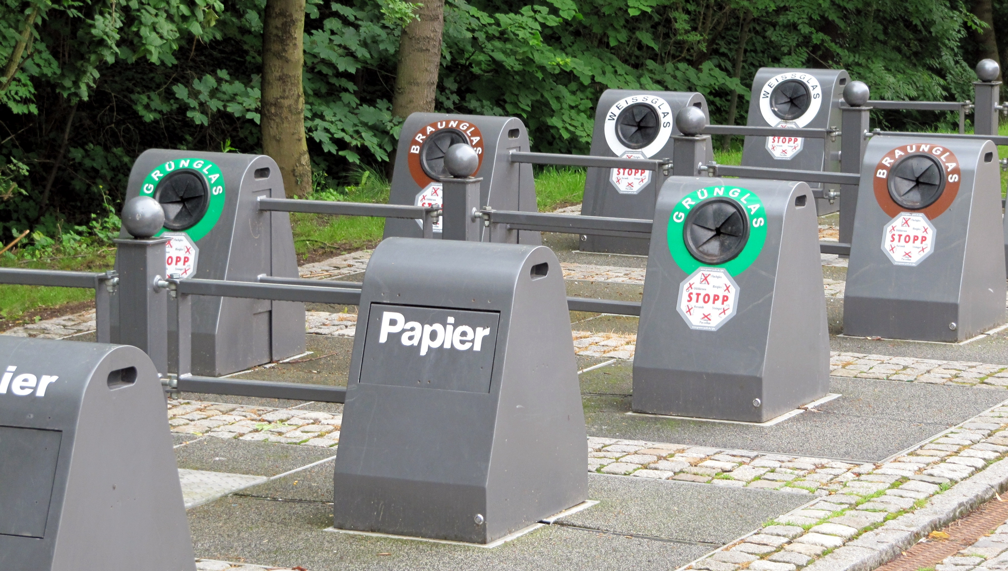 Unterflur-Abfallbehälter in Thüringen 2012